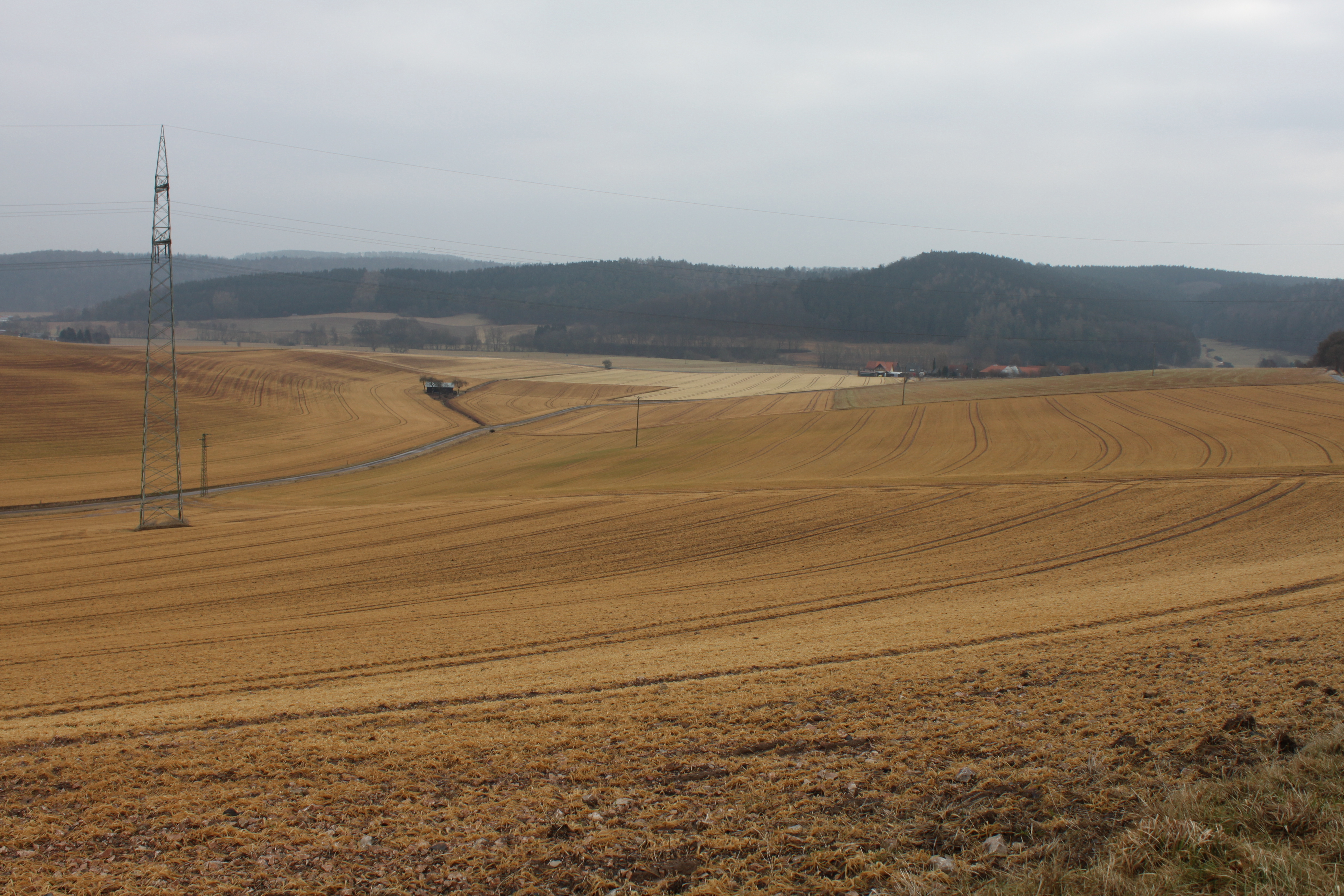 Landschaftsschutzgebiet Freiflächen westlich Udorf von Nordostecke des NSG Glockengrund gesehen. Udorf rechts hinten. Wald im Hintergrund gehört bereits zu Hessen.